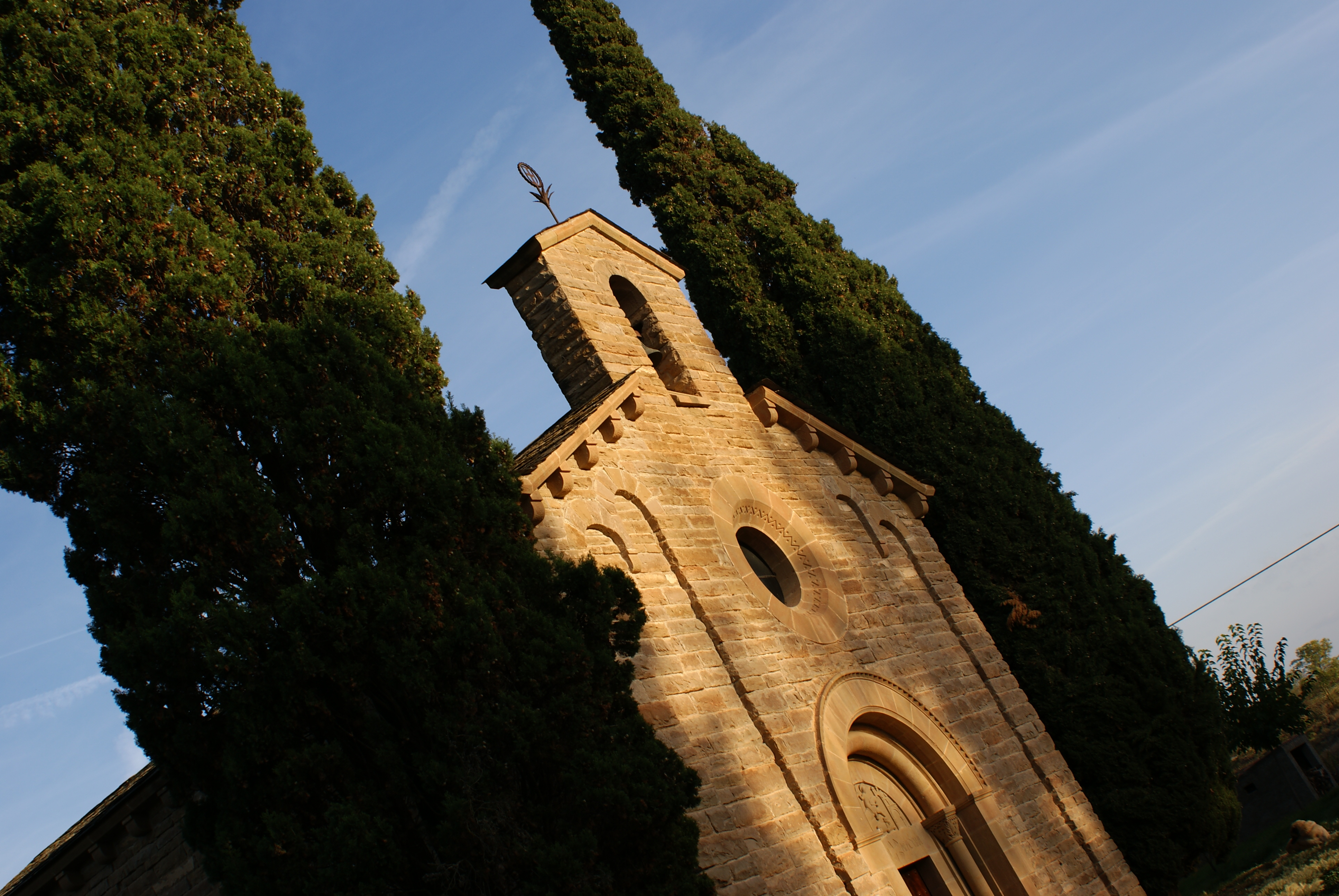 Ermita ubicada en la finca rústica Sant Jordi de Mollé en el municipio de La Sentiu de Sió.